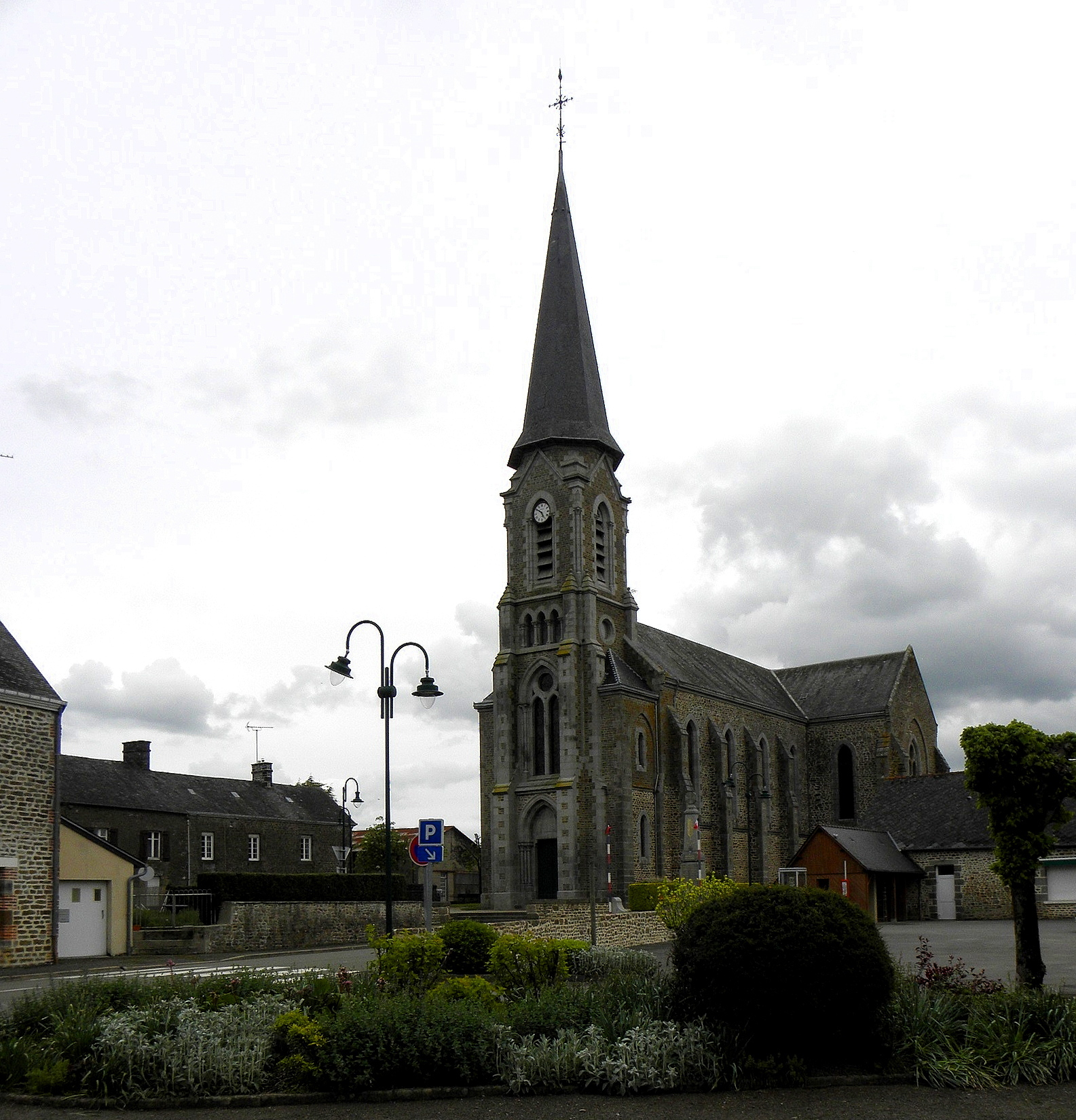 Église Saint-Médard de Saint-Mars-sur-Colmont (53). Flanc sud.